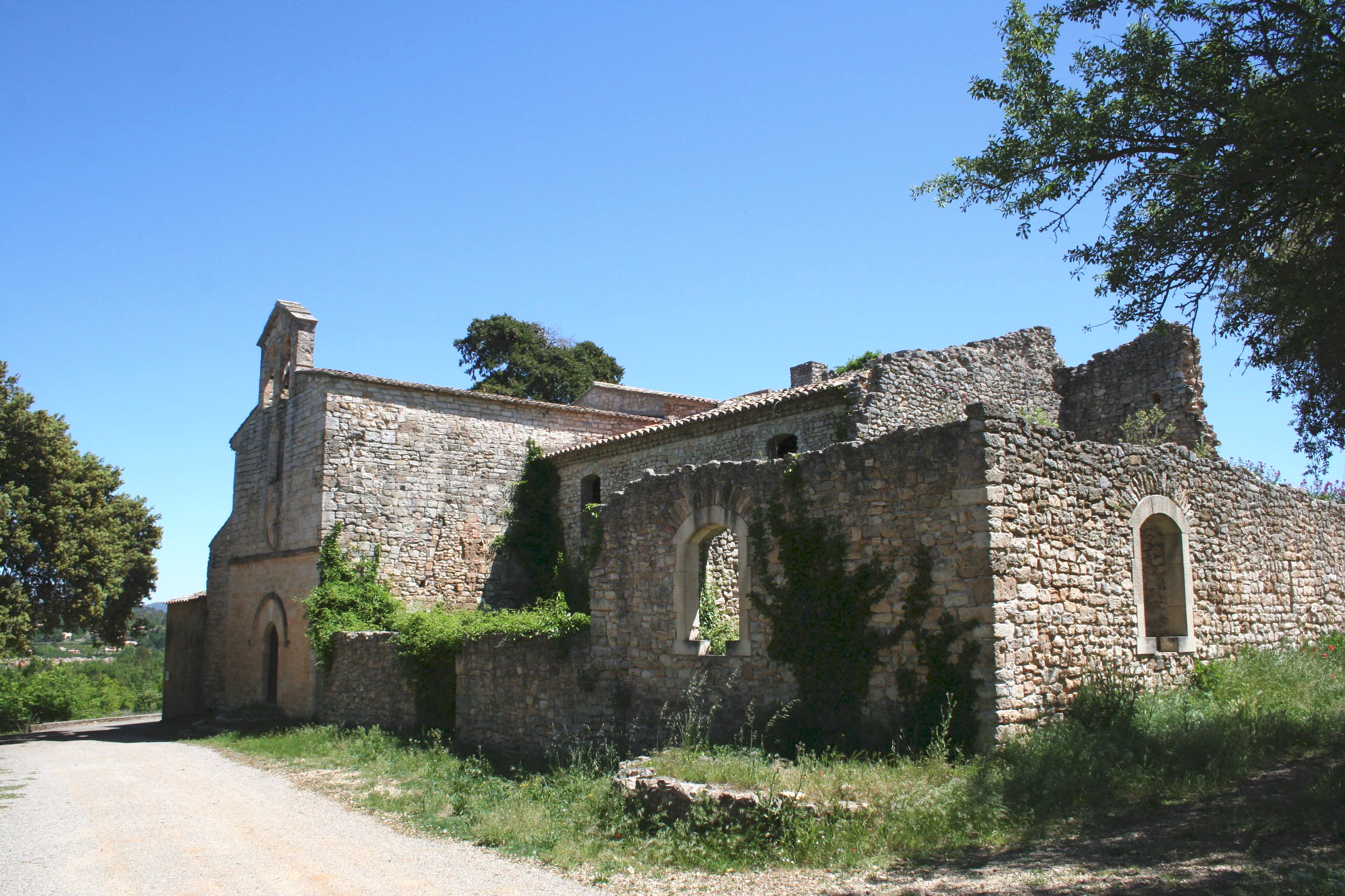 Eglise de Notre-Dame à Brue-Auriac (Var) .